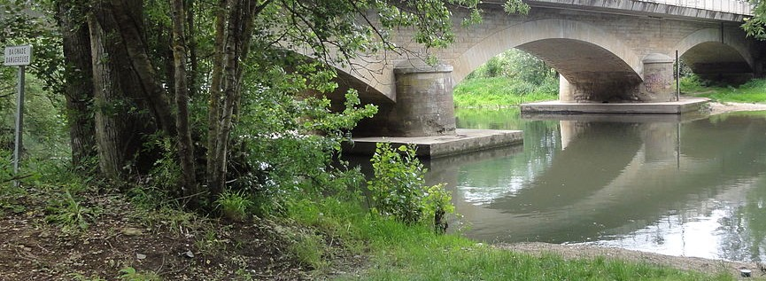 La rivière du Clain, à Naintré.